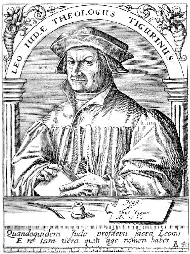 Kupferstich Leo Jud (1482-1542); Schweizer Reformator, Theologe